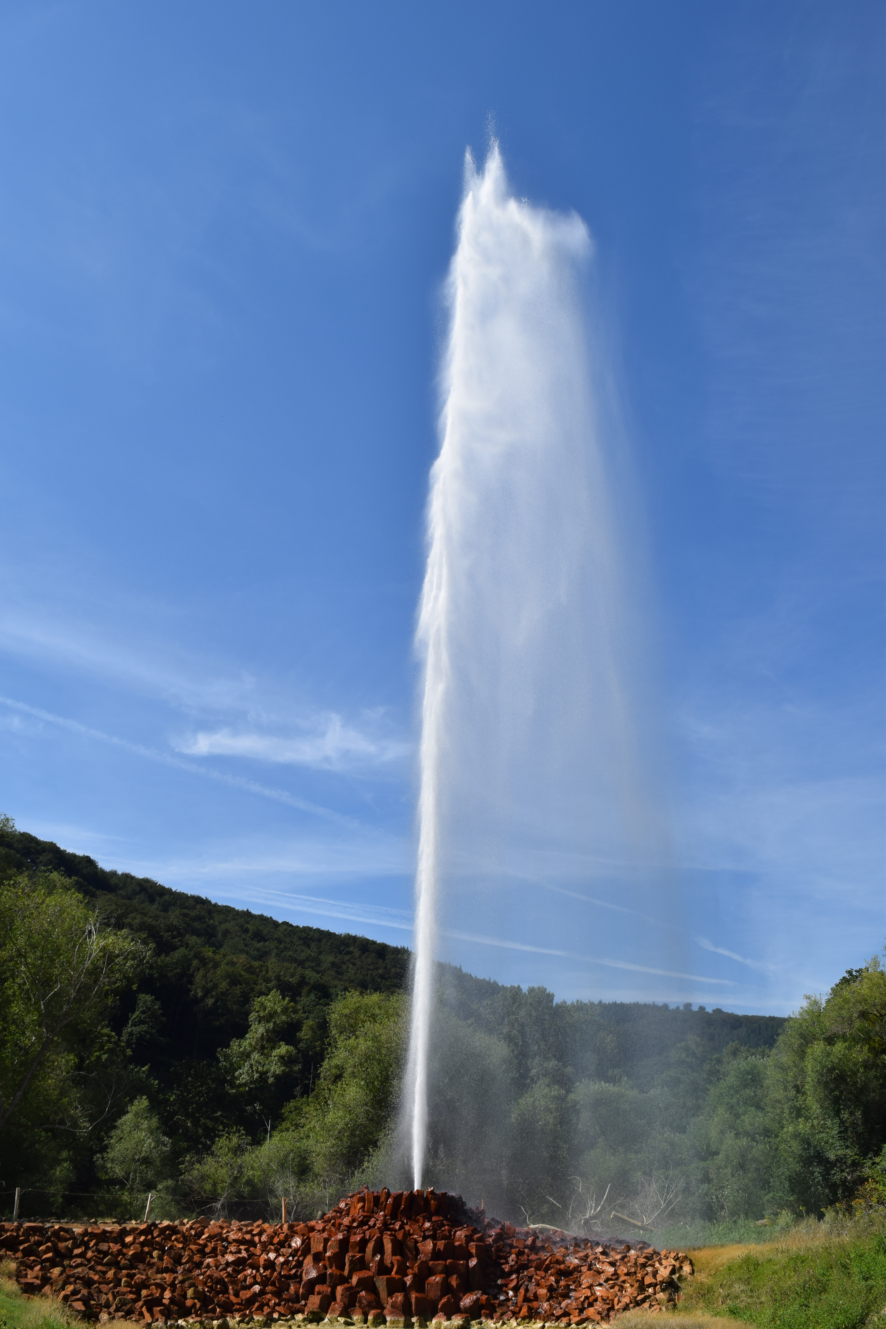 Der Geysir in maximaler Höhe!